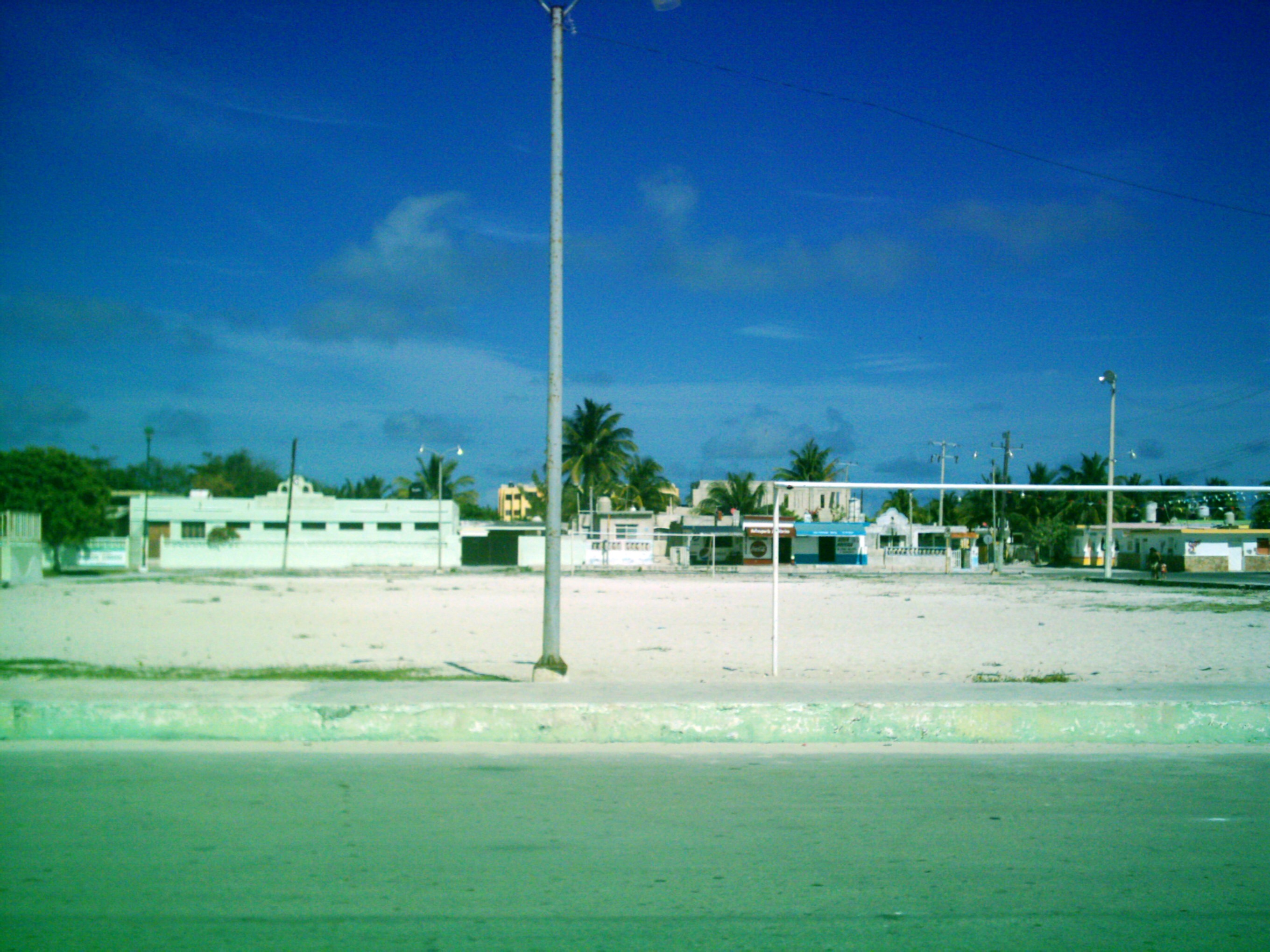 Parque de Chuburná Puerto, Yucatán.